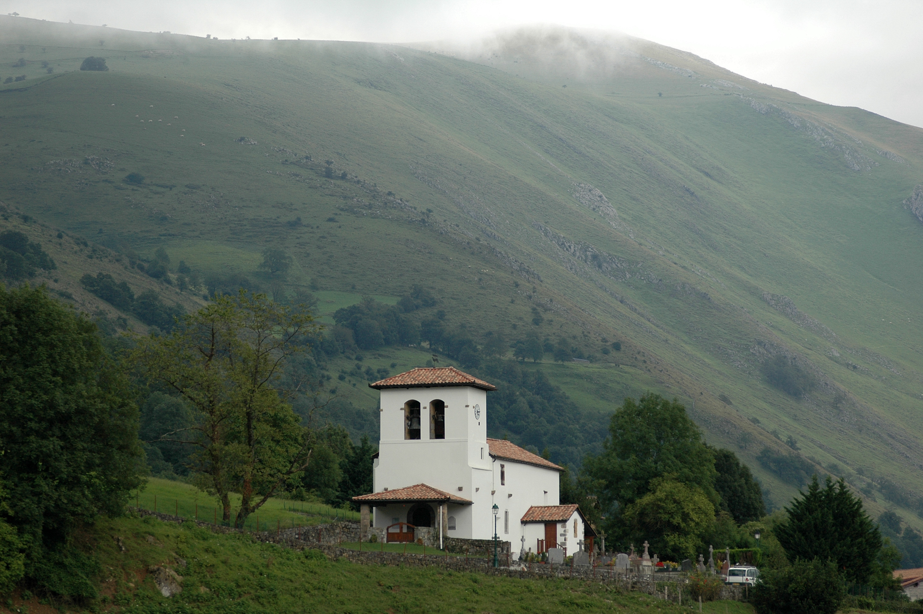 Béhorléguy, église de l'Assomption